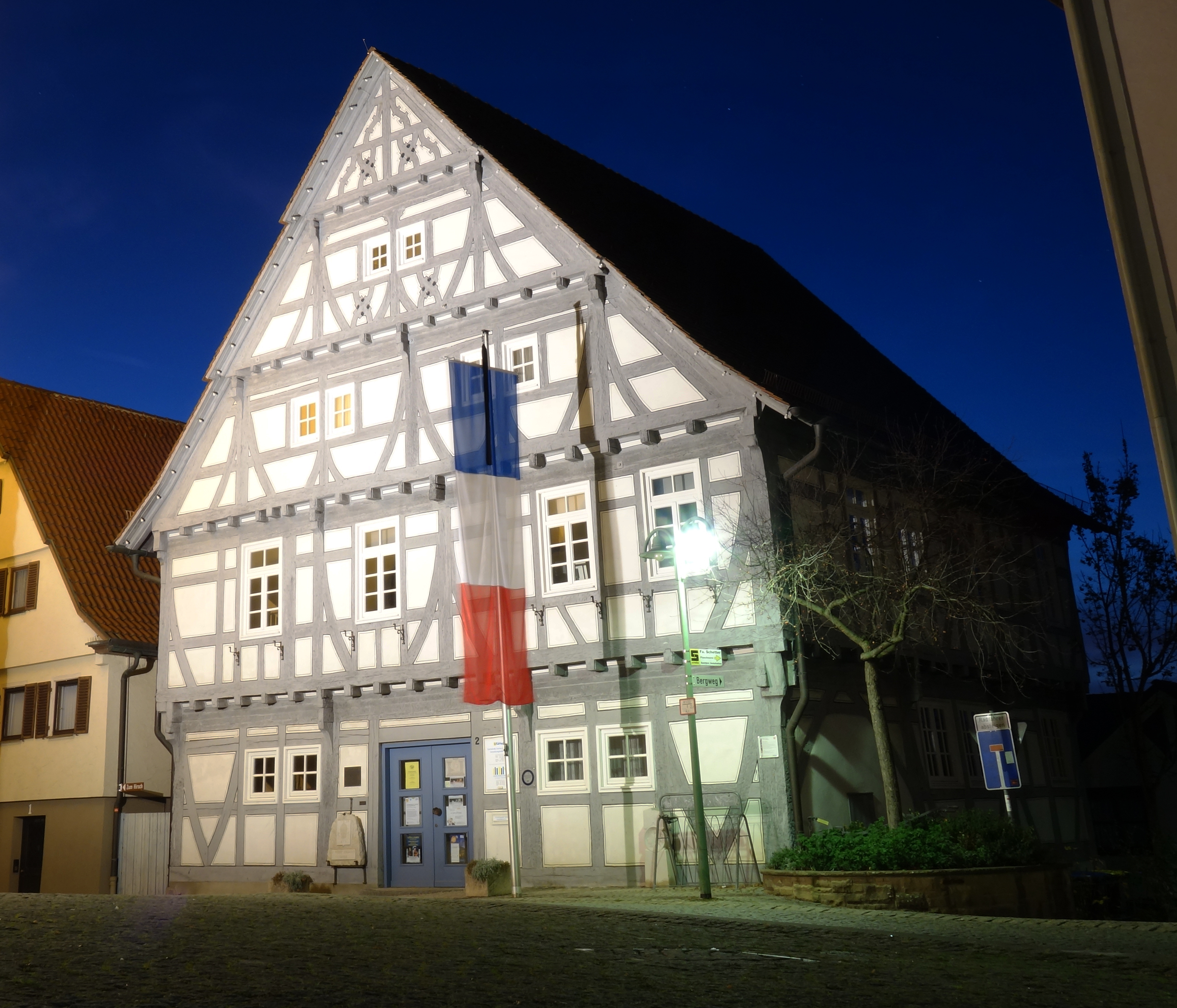 Altes Rathaus in Stetten im Remstal mit französischer Nationalflagge.